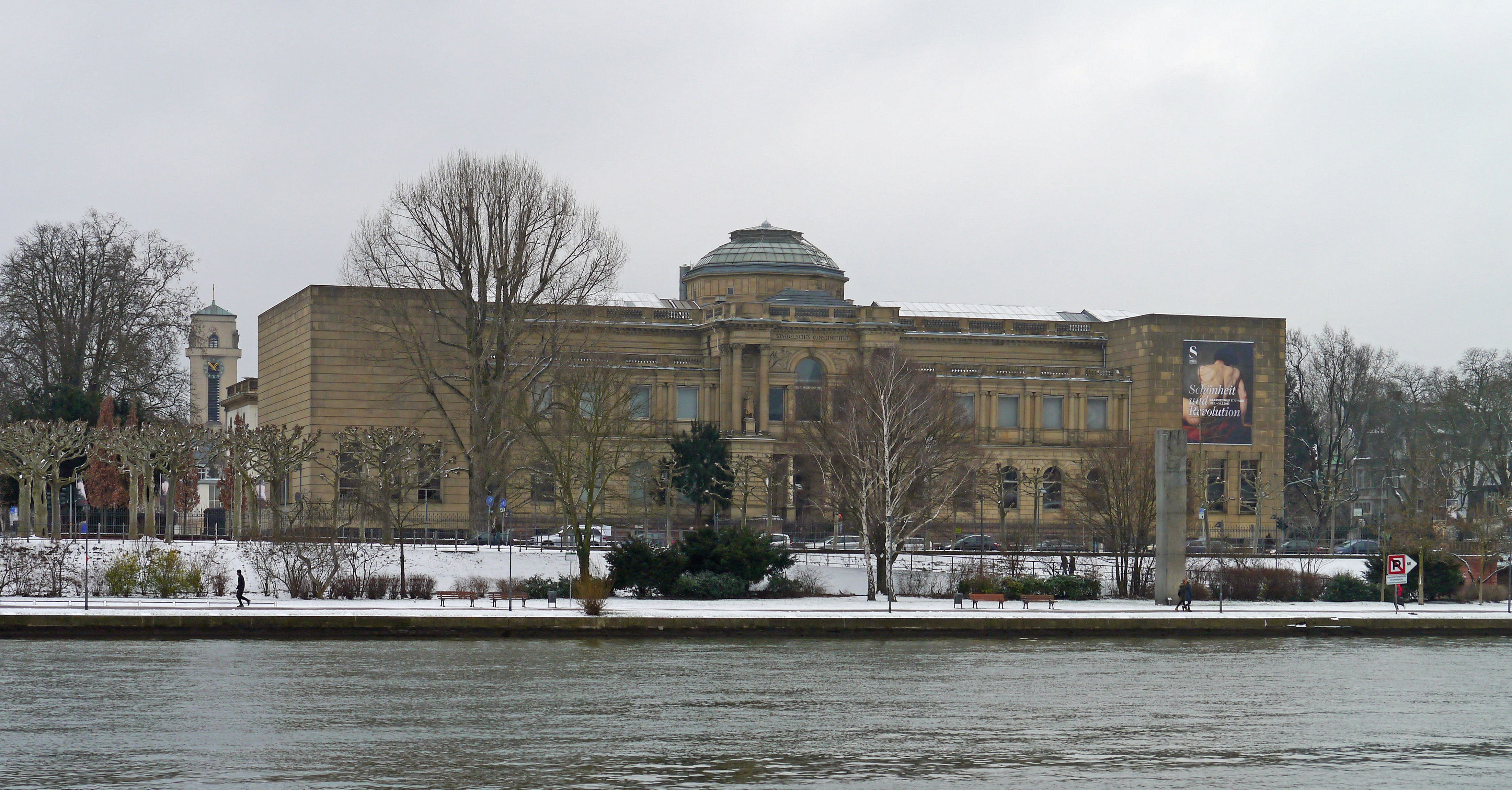 Das Städel in Frankfurt am Main.